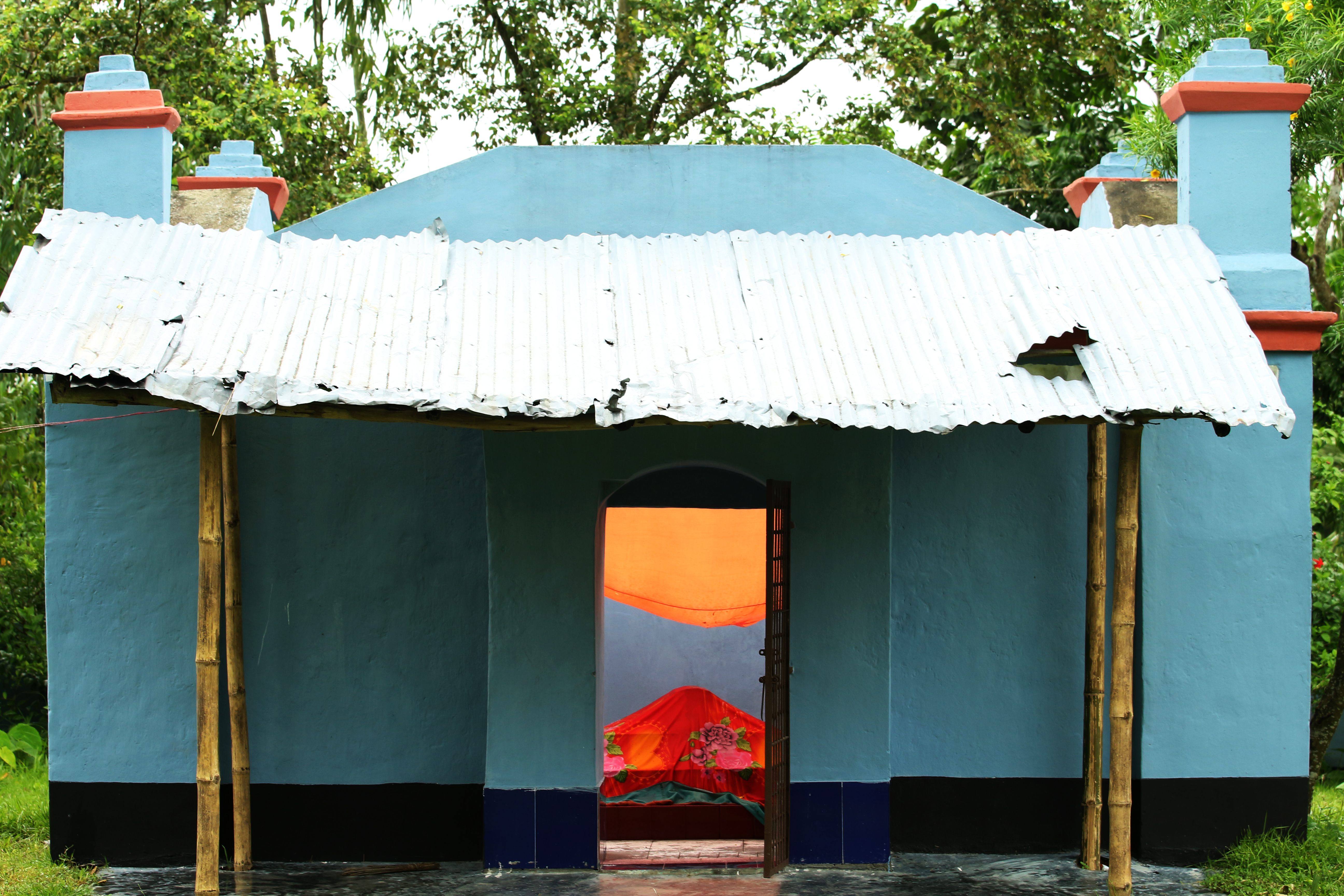 কাটাদুয়ার দরগাহ, পীরগঞ্জ, রংপুর। বাগদুয়ার দরগাহ নামেও পরিচিত।